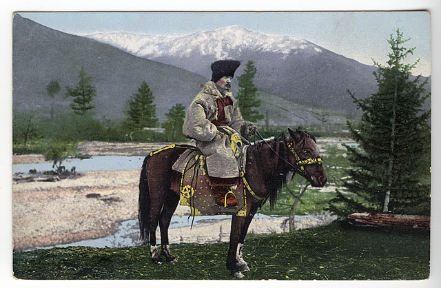 Мужчина алтаец в национальном костюме (головной убор - куараан борук, овчинная шуба - тон, со ступенчатым вырезом) на лошади